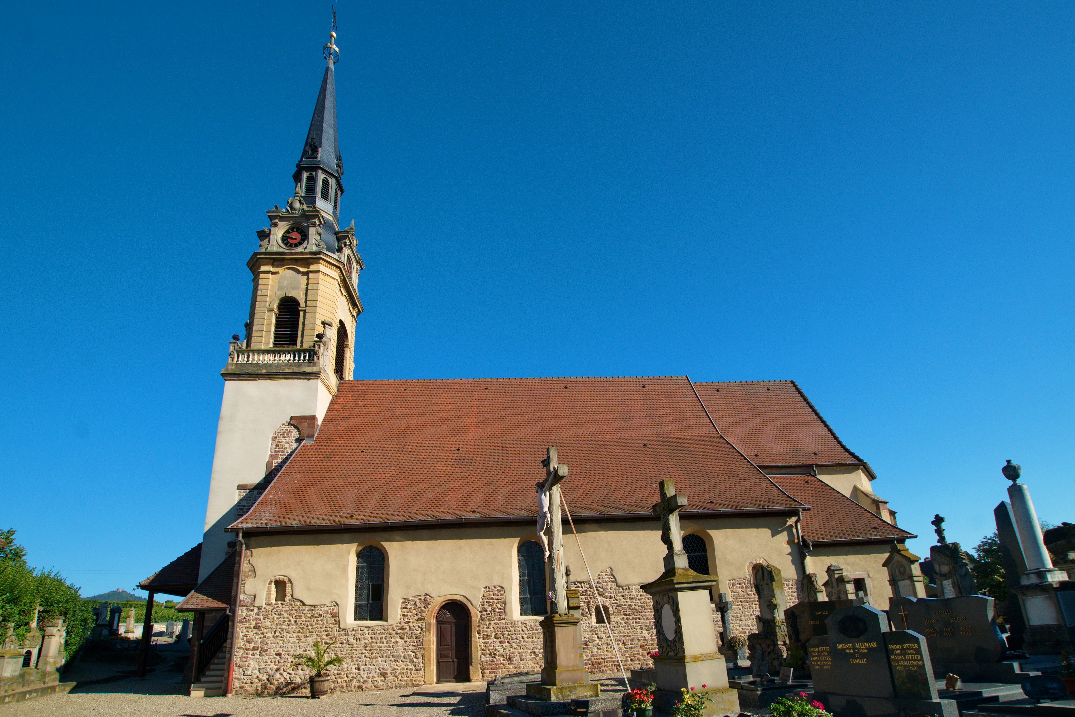 Église Sainte-Colombe de Hattstatt, 11 rue du Bourgrain (Inscrit, 1984) .